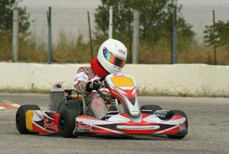 Stéphanie Rolling - Sodi - Rotax Max